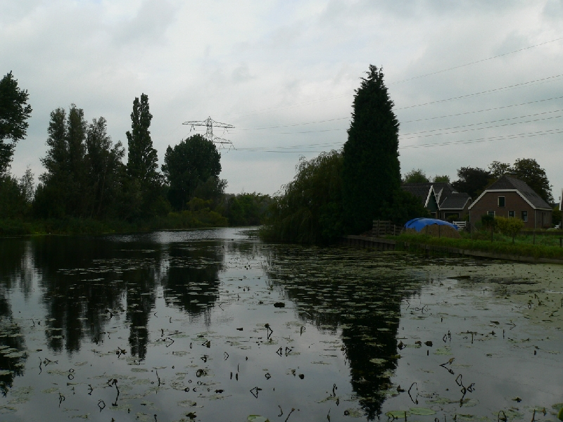 Poldervaart Schiedam